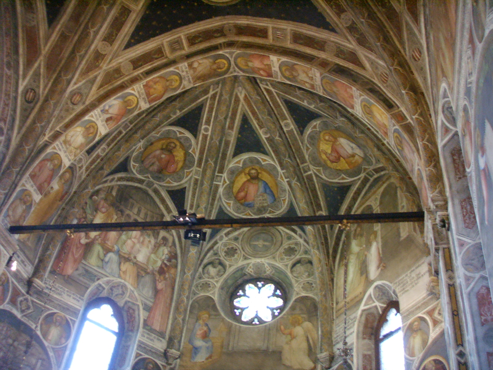 Padova, basilica del santo, cappella con affreschi di giusto dei menabuoi